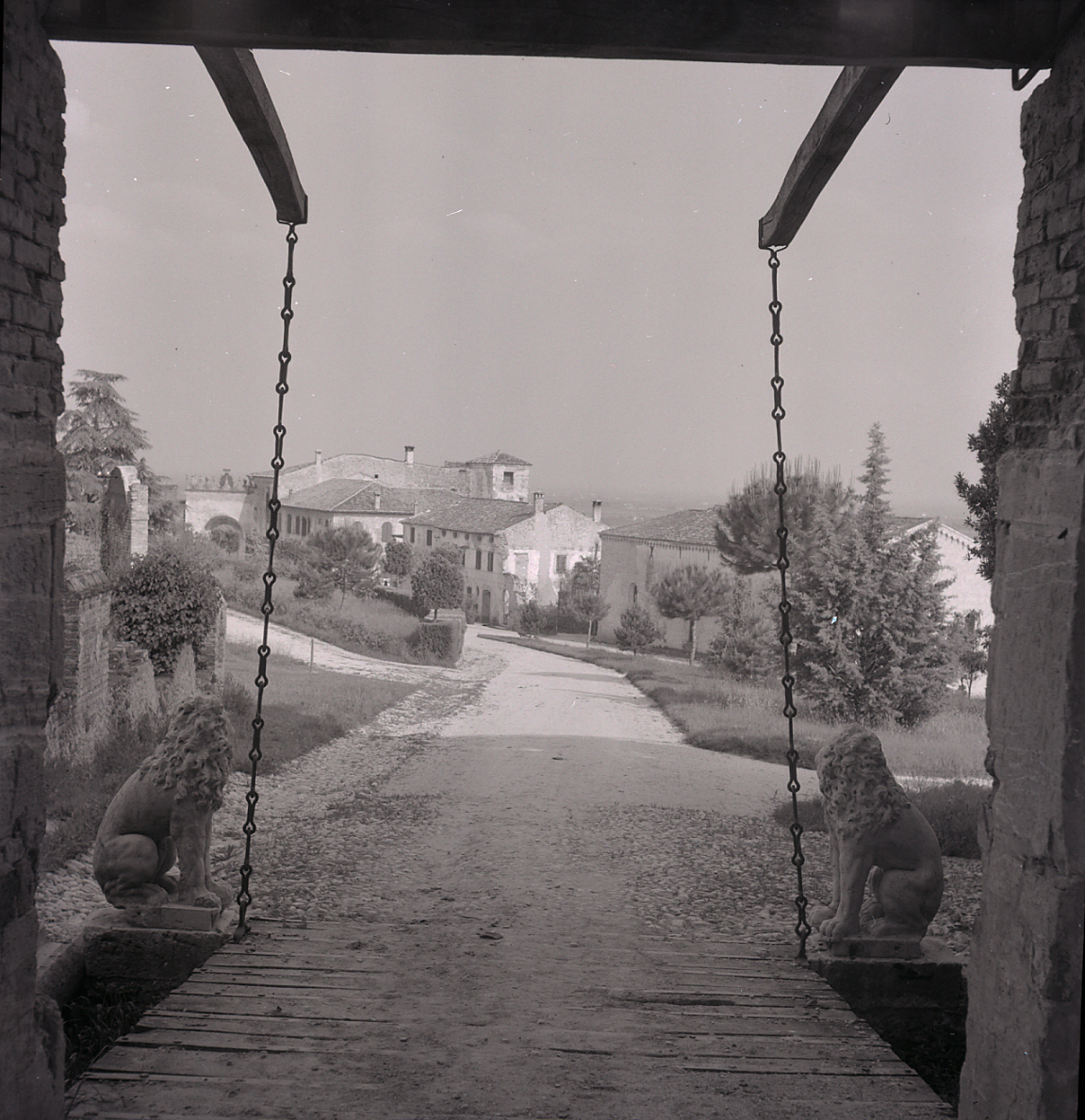 Veneto. Località non identificata (Castello San Salvatore - Susegana - TV). Castello. Serie fotografica : Italia, 1975 / Paolo Monti. - Buste: 2, Fototipi: 2 : Negativo b/n, gelatina bromuro d'argento/ pellicola ; 6x6. - ((Serie costituita da 2 negativi identificati con la numerazione: 3749-3750. Sulla busta R3749 manoscritto: "Castello veneto". La suddetta serie è contenuta nella scatola identificata con la numerazione R3499/3788. Sul coperchio iscrizione manoscritta a pennarello: "1 Località varie".